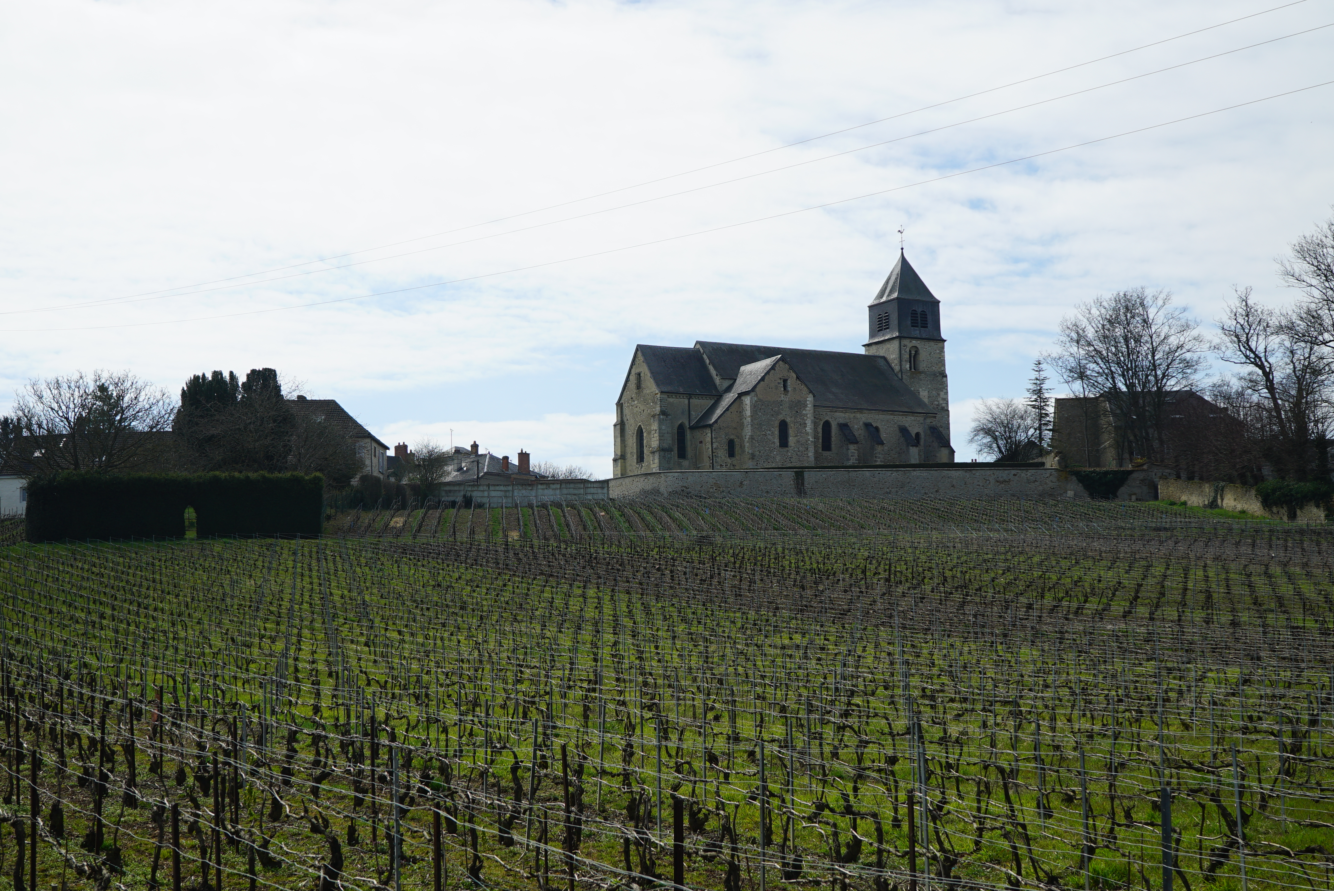 vue de l'Église Sainte-Agathe de Villers-Allerand.